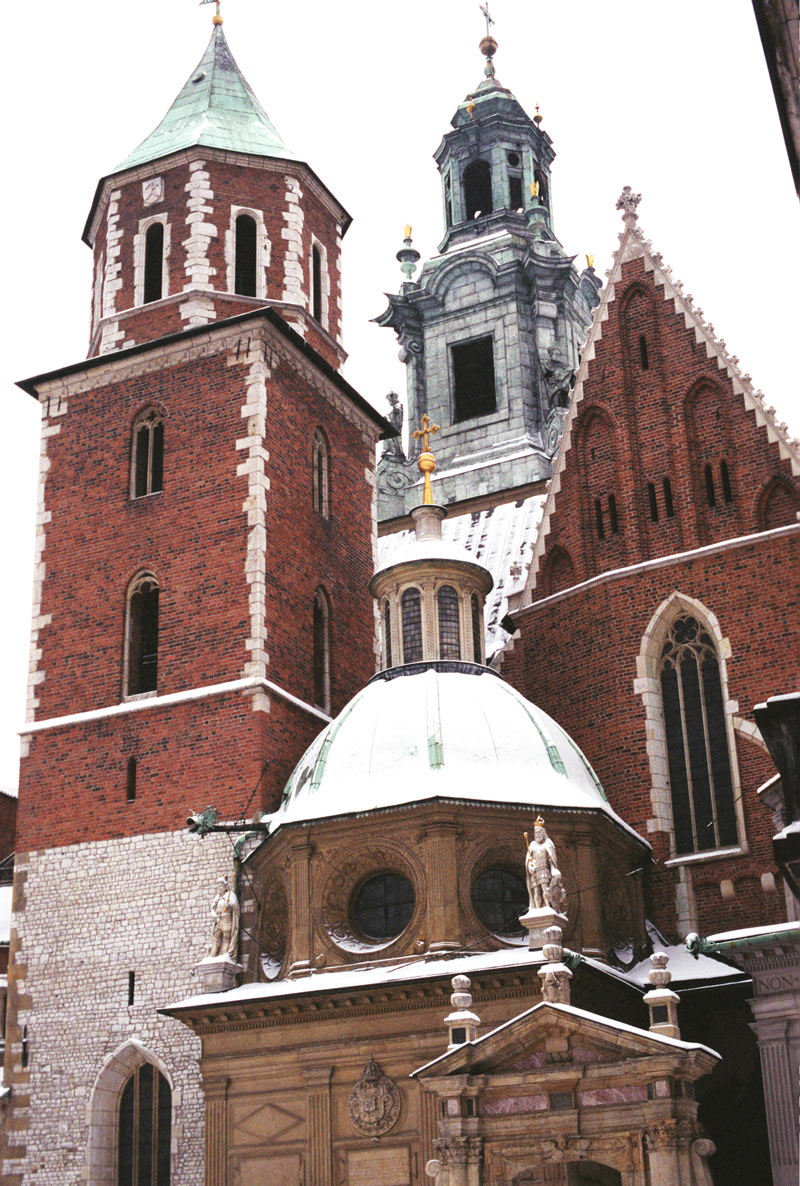 Katedra na Wawelu − bazylika archikatedralna św. Stanisława i św. Wacława w Krakowie